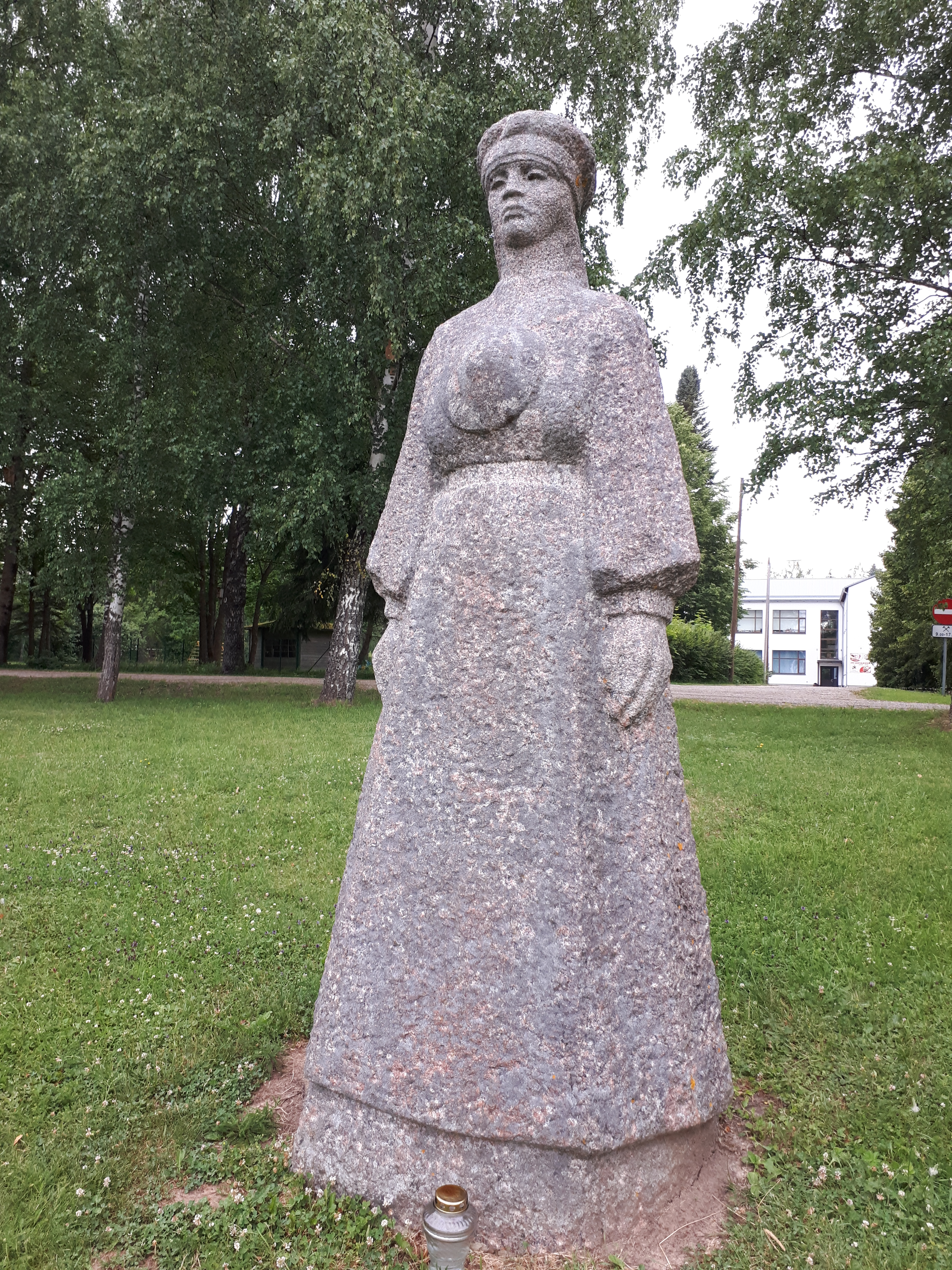 Pomnik Śpiewającej Matki, utożsamianej z setuską poetką Hilaną Taarką, Obinitsa, Estonia. Region Setomaa.